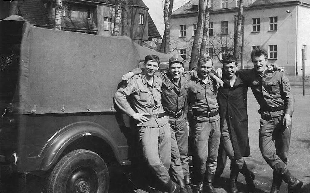 Strażnica Wojsk Ochrony Pogranicza Gorzyce - drugi z prawej: szer. Wojciech Janiszewski, pozostali nn, przy samochodzie terenowym GAZ-69